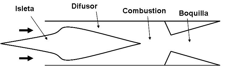 Ramjet Desig